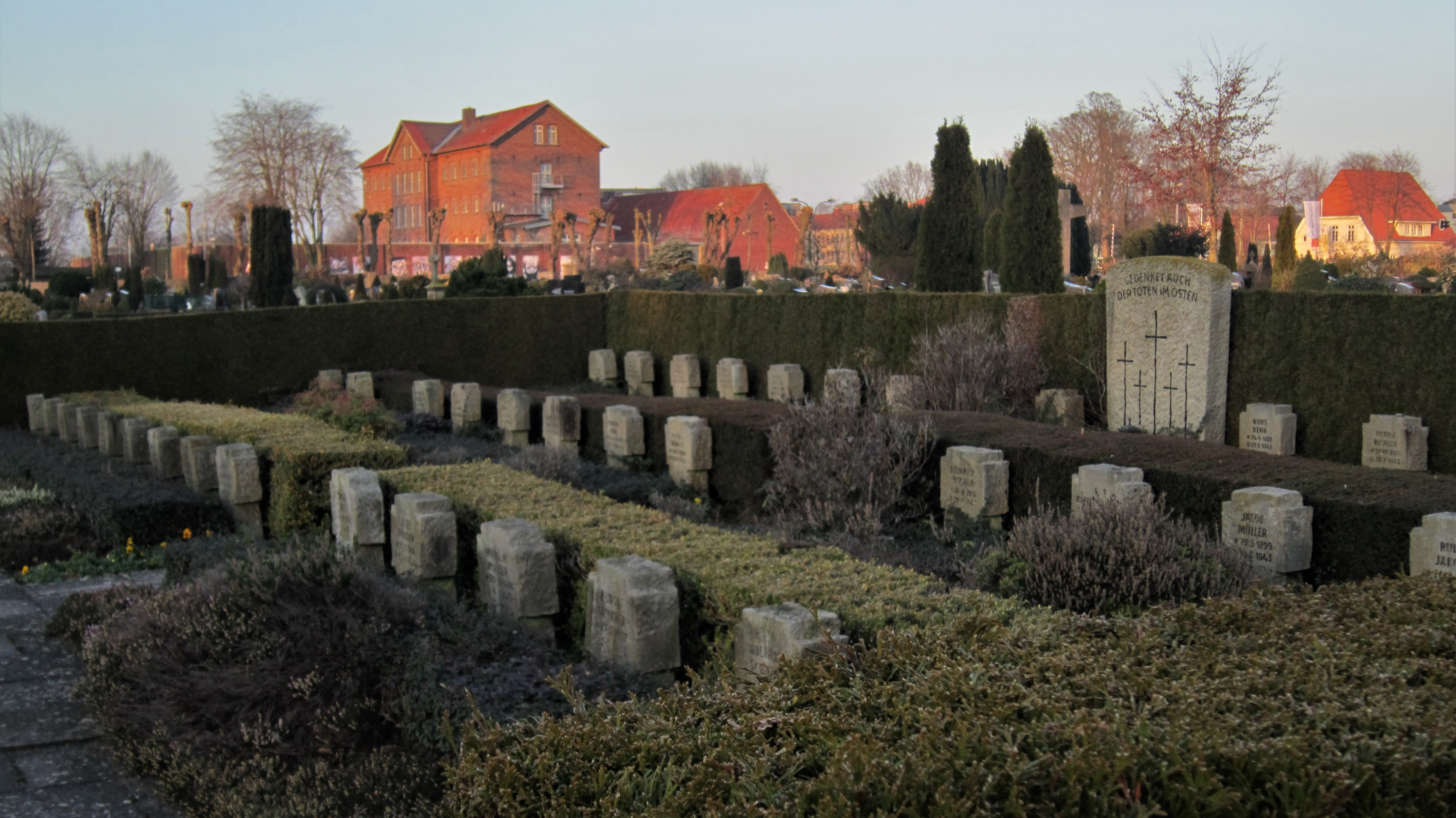 Überblick über den Südosten der ehemaligen Zitadelle Vechta: Im Vordergrund die Kriegsgräber auf dem katholischen Friedhof; hinten links die JVA für Frauen (Adresse: Zitadelle 2); hinten ganz rechts das Gebäude des Offizialats Vechta im Bistum Münster.